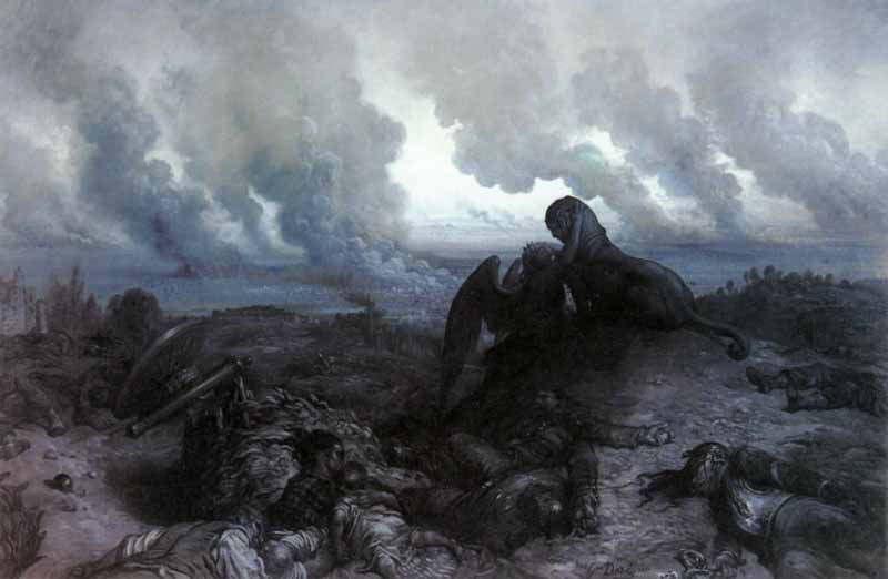 Gustave Doré, Enigma, Belfort, Musée des beaux-arts.